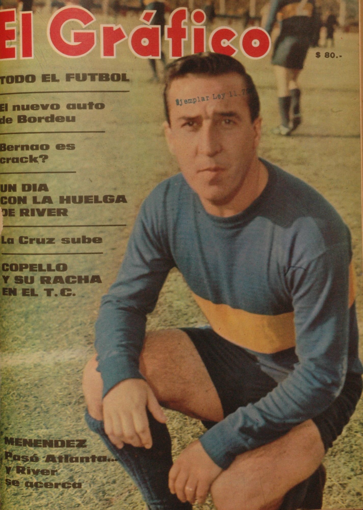 El Grafico del 18 de Abril de 1967. Edicion 2480